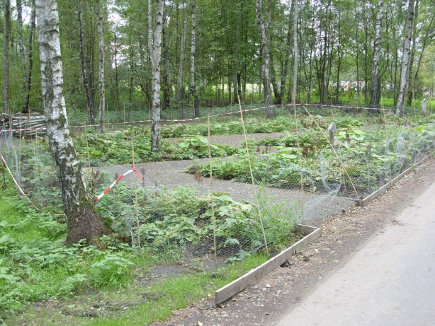 Landesgartenschau Norderstedt, Blumeninsel im Waldpark während der Bauphase